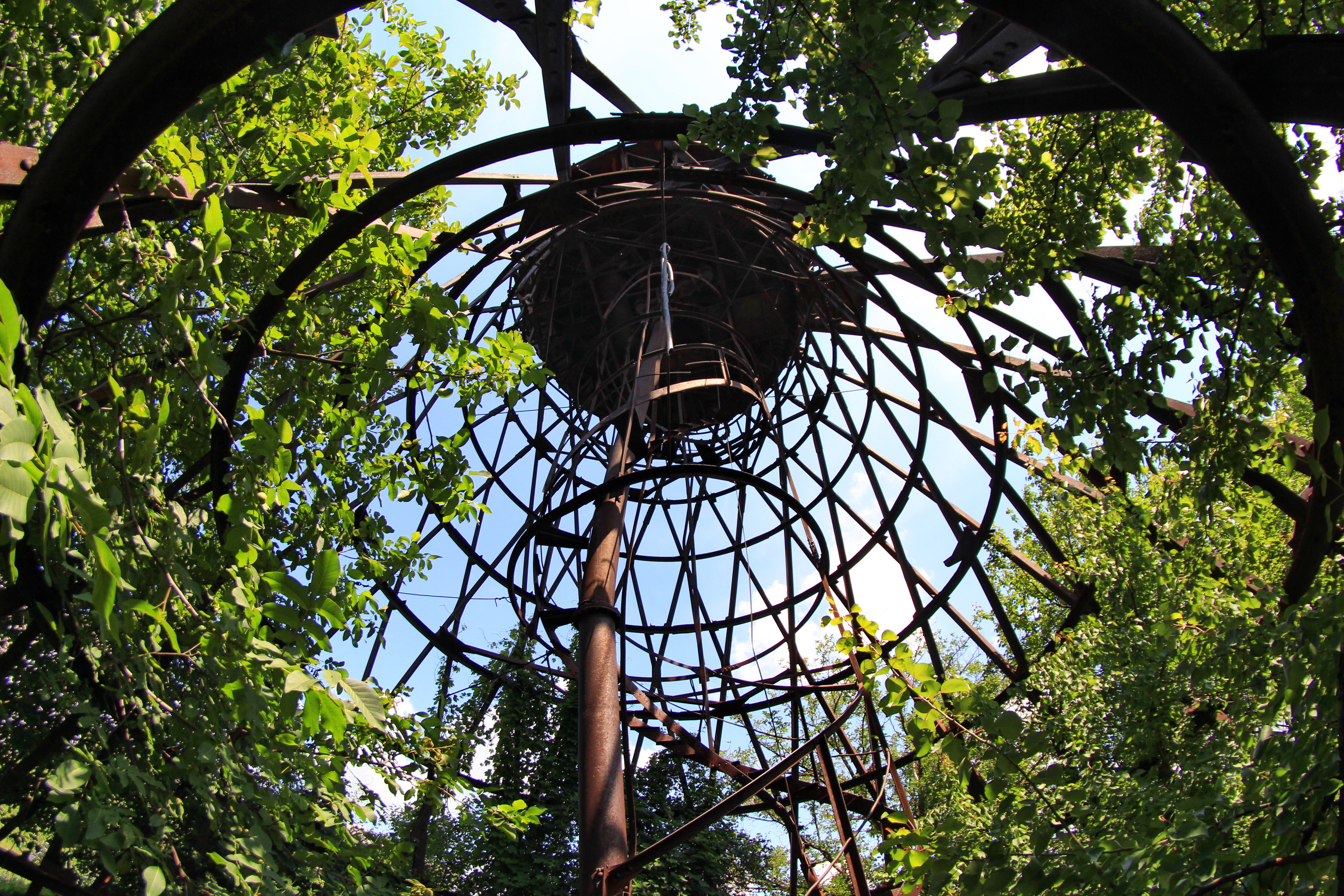 Гіперболоїдна вежа інженера Шухова, місто Помічна